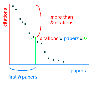 H-Index von einer Reihe Veröffentlichungen und deren Zitationen.